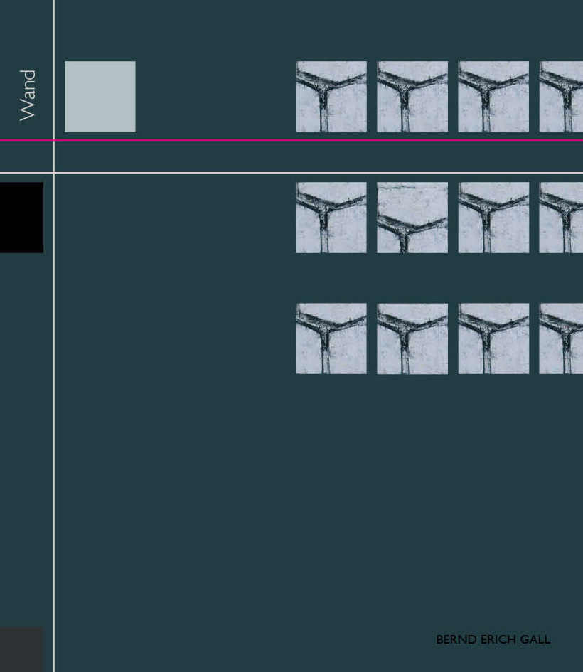 Kunstkatalog: Bernd Erich Gall: Wand. - 2012